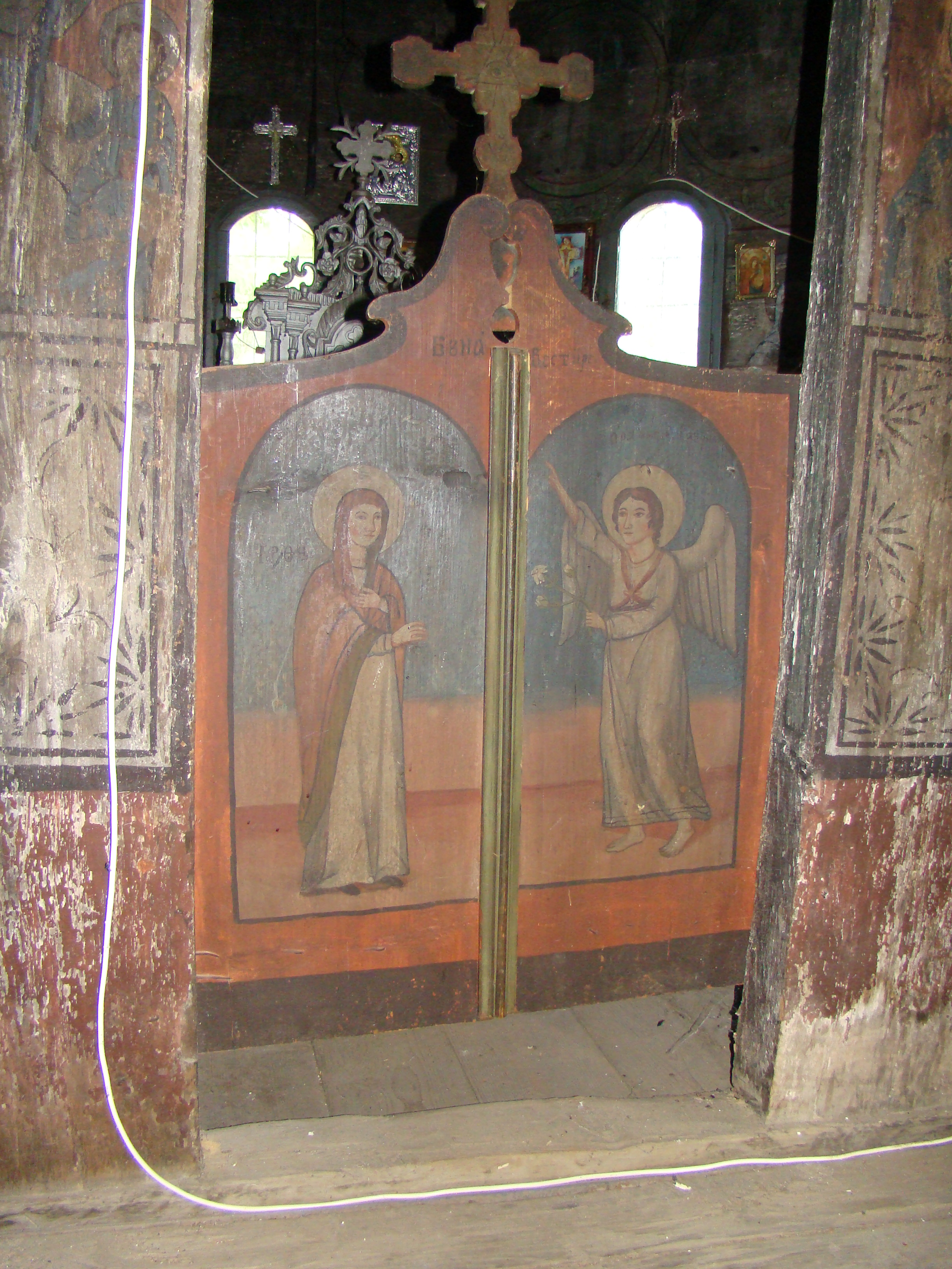 Biserica de lemn din Fânațe-Bihor